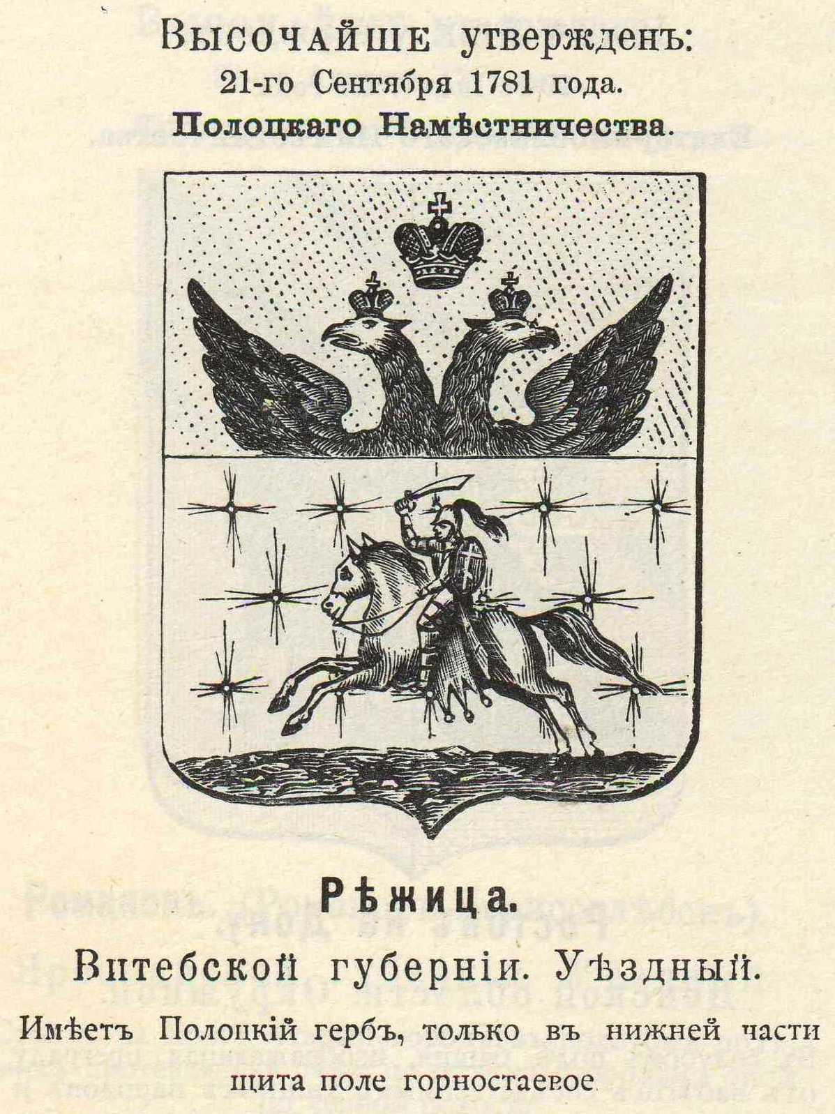 Сoat of arms of Rzezyca Герб Российской Империи уездного города Режица Витебской губернии с официальным описанием в Гербовнике Винклера.